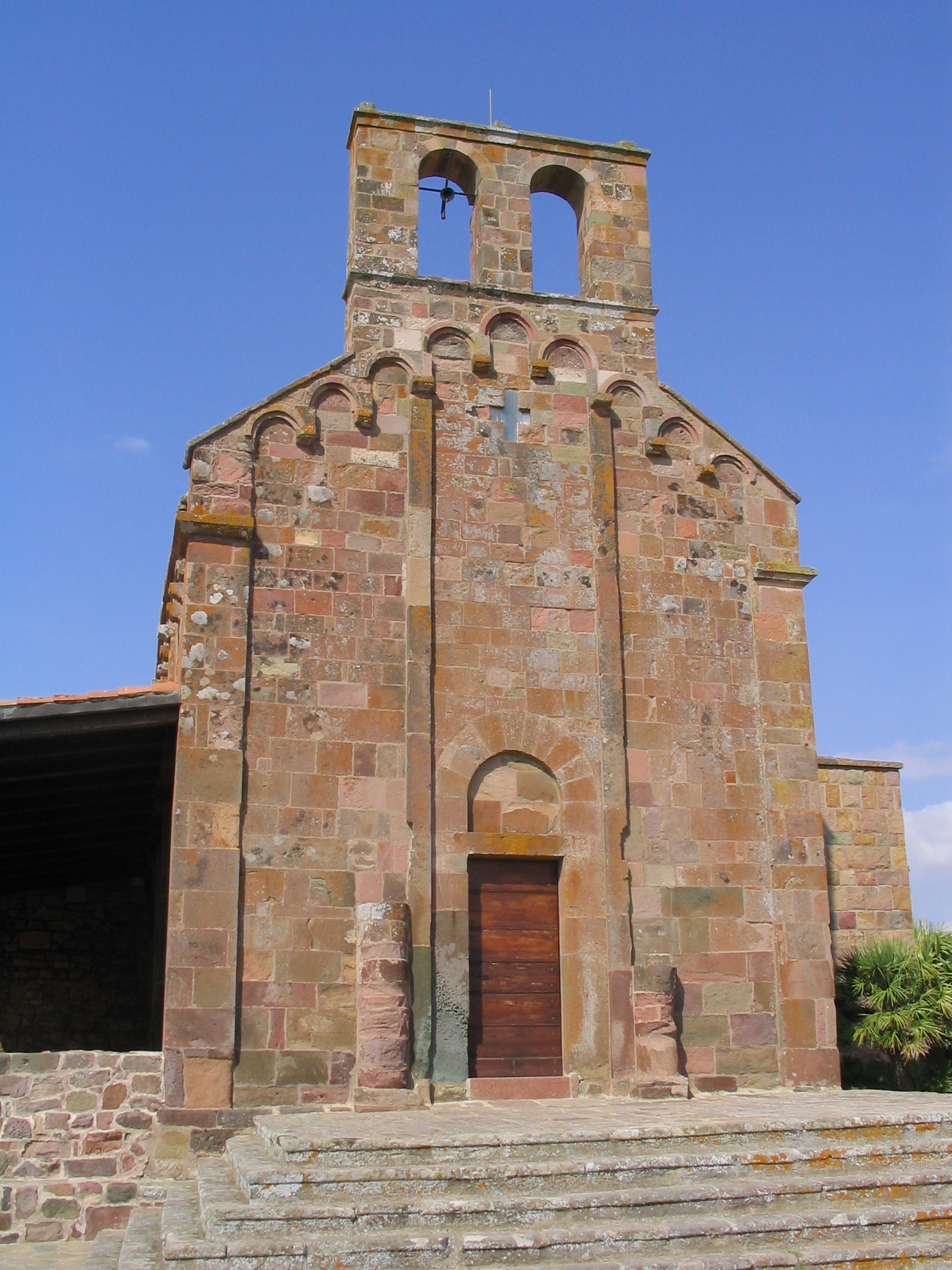 Església romànica de Nostra Signora di Castro. Sardenya